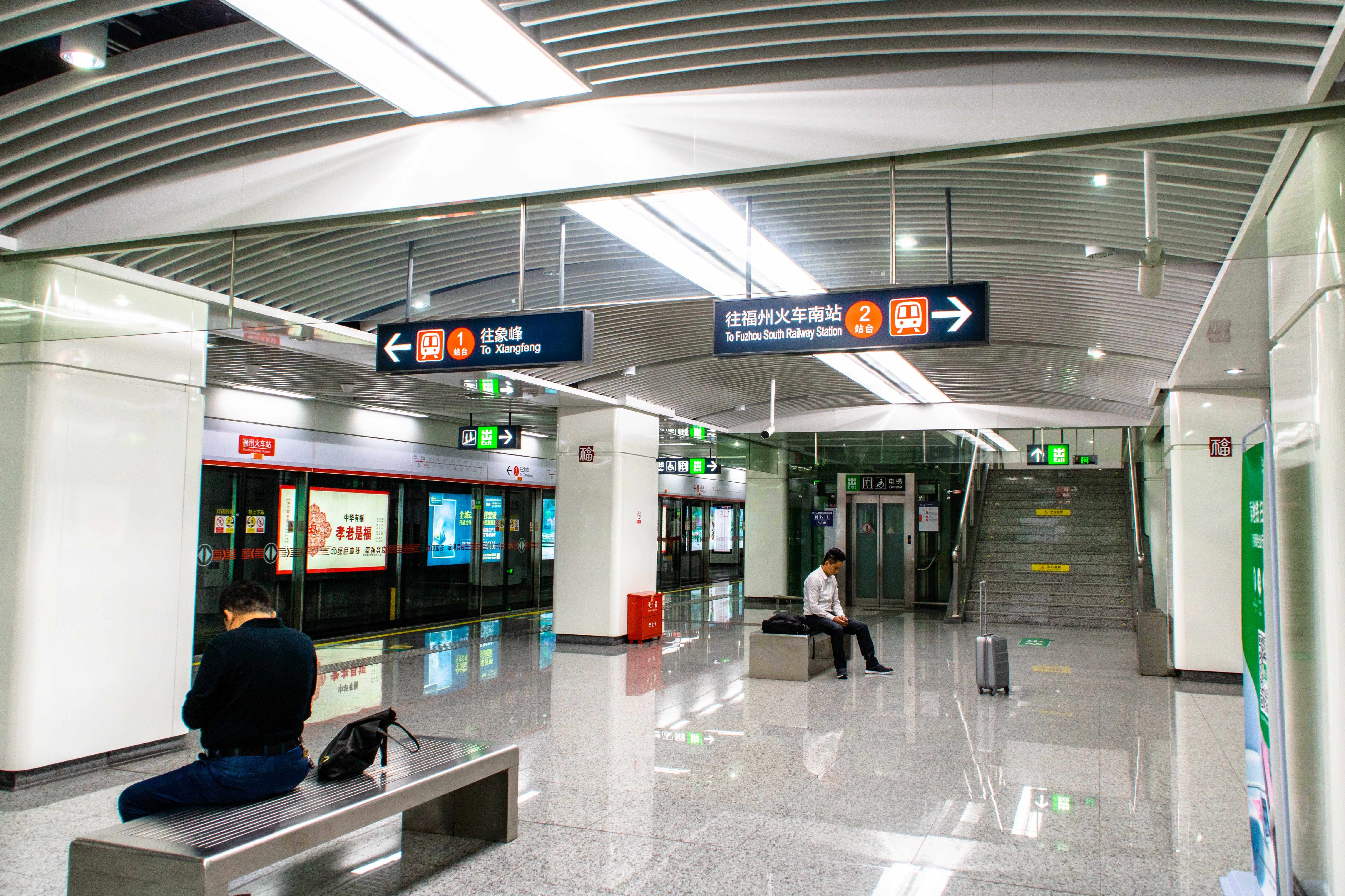 中文（中国大陆）: 福州火车站站站台